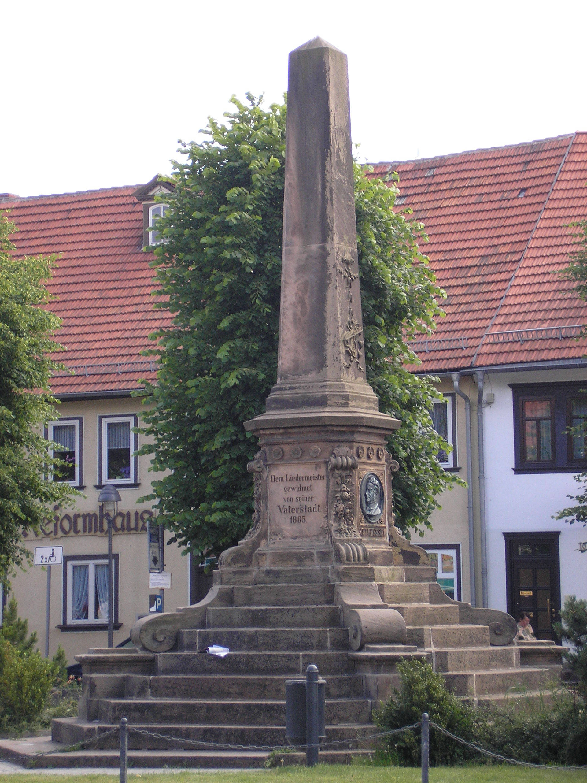 Obelisk zu Ehren von Methfessel auf dem Markt in Stadtilm (Thüringen).